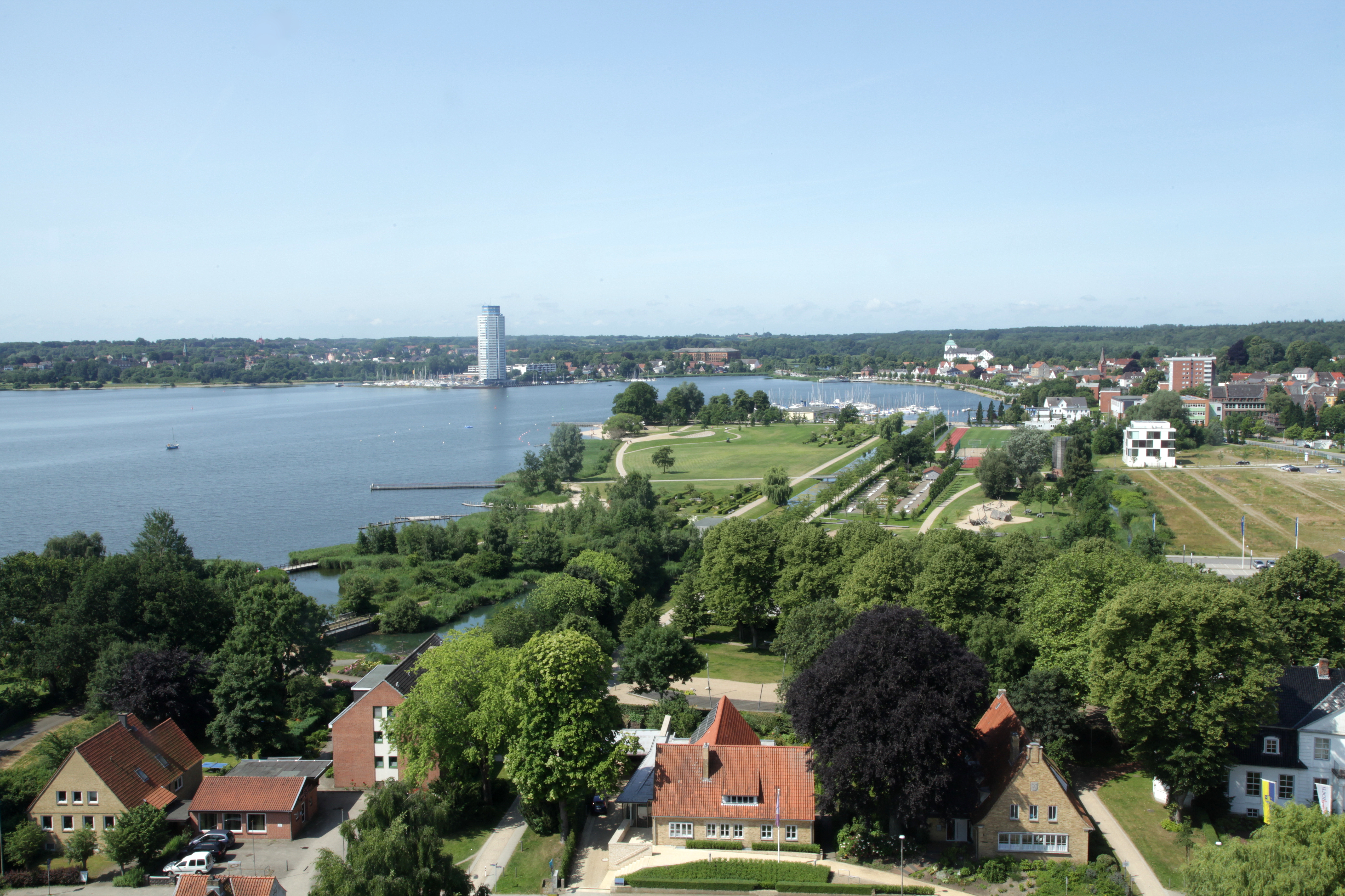 Blick vom Domturm (durch ein leider sehr dreckiges Fenster) zu den Königswiesen und über die Schlei zum Wikingturm in Schleswig